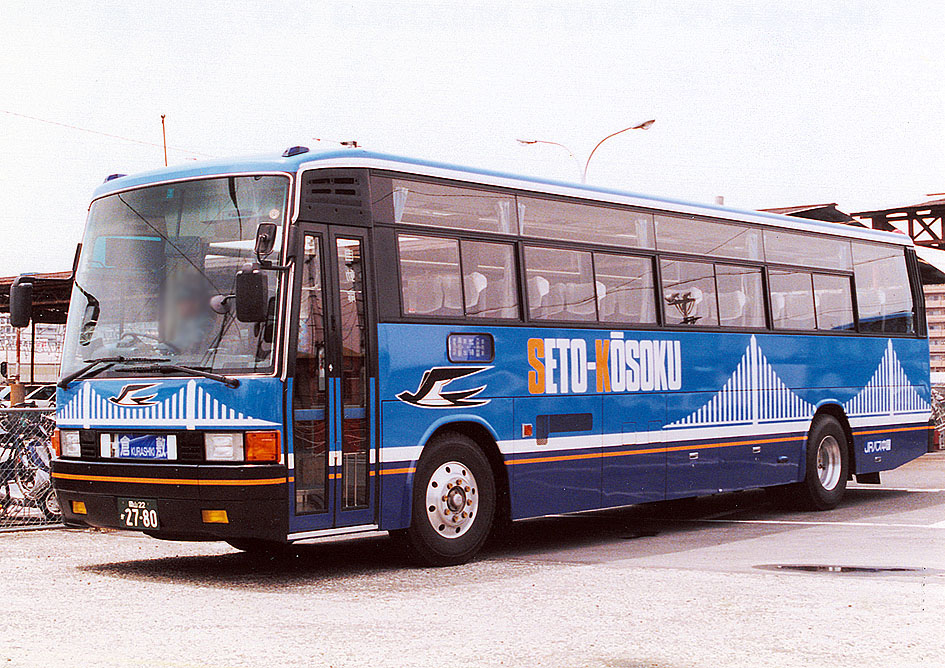 JRバス中国 瀬戸大橋特急線 専用車両 644-7917